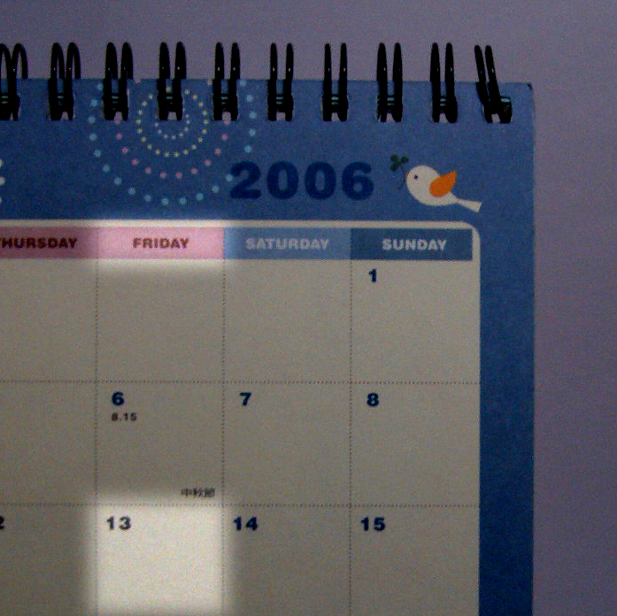 13號星期五的圖解